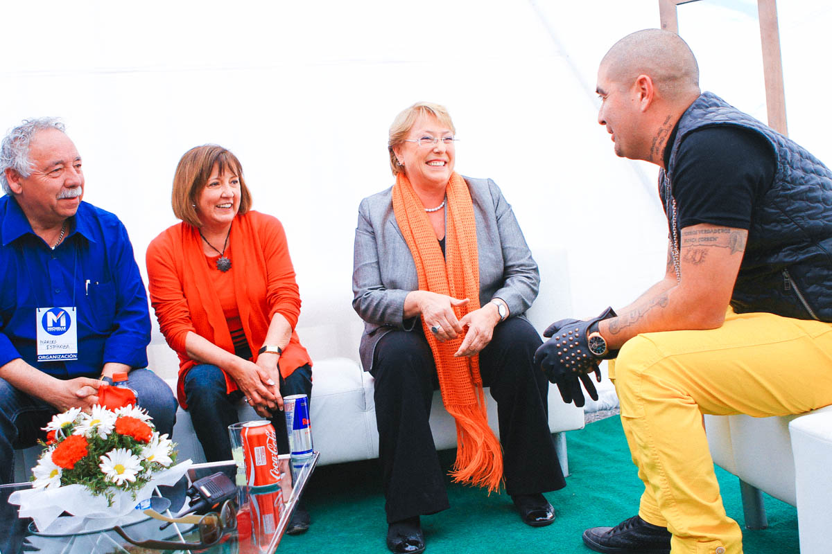 Soledad Alvear, Michelle Bachelet y DJ Méndez.